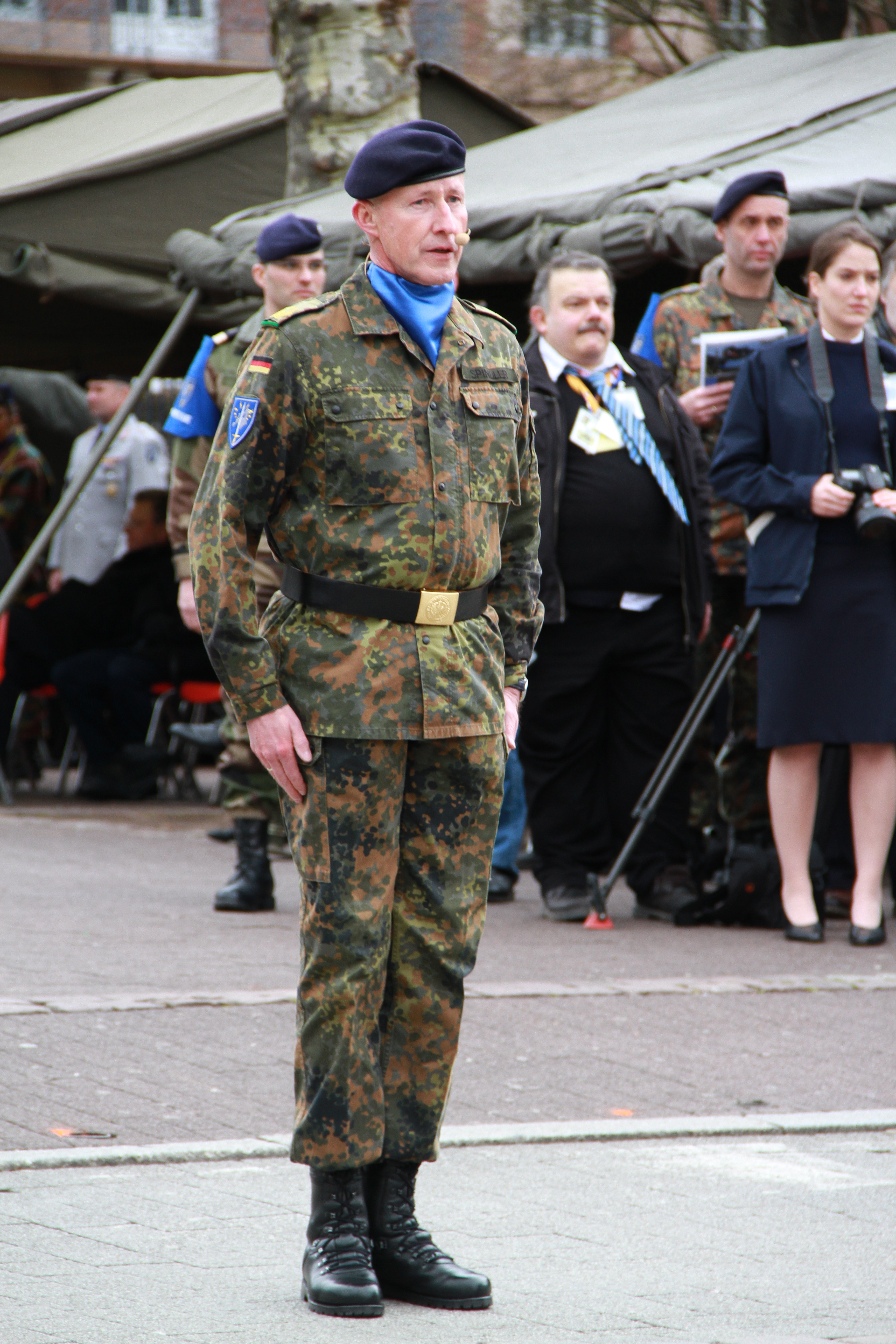 Le général Walter Spindler, commandant adjoint de l’Eurocorps lors de la prise d’armes de fin de mission de l’Eurocorps en Afghanistan, place Broglie à Strasbourg 31 janvier 201, en présence de M. Pieter De Crem, ministre belge de la Défense, et de M. Kader Arif, ministre délégué auprès du ministre de la Défense, chargé des Anciens Combattants.